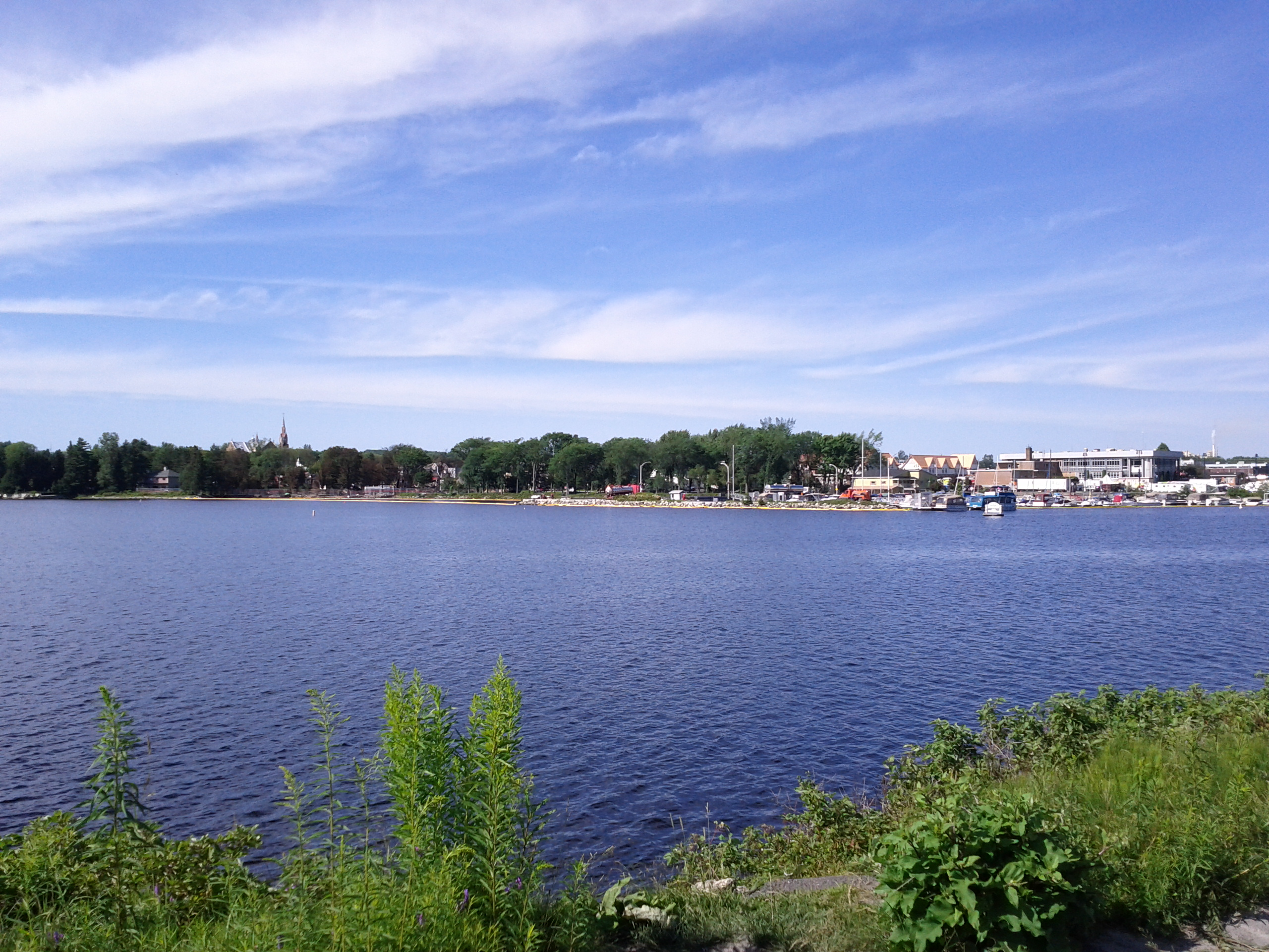 Vue générale du sud de la zone du centre-ville de Lac-Mégantic qui a subi d'importants dommage lors de l'accident ferroviaire du 6 juillet 2013